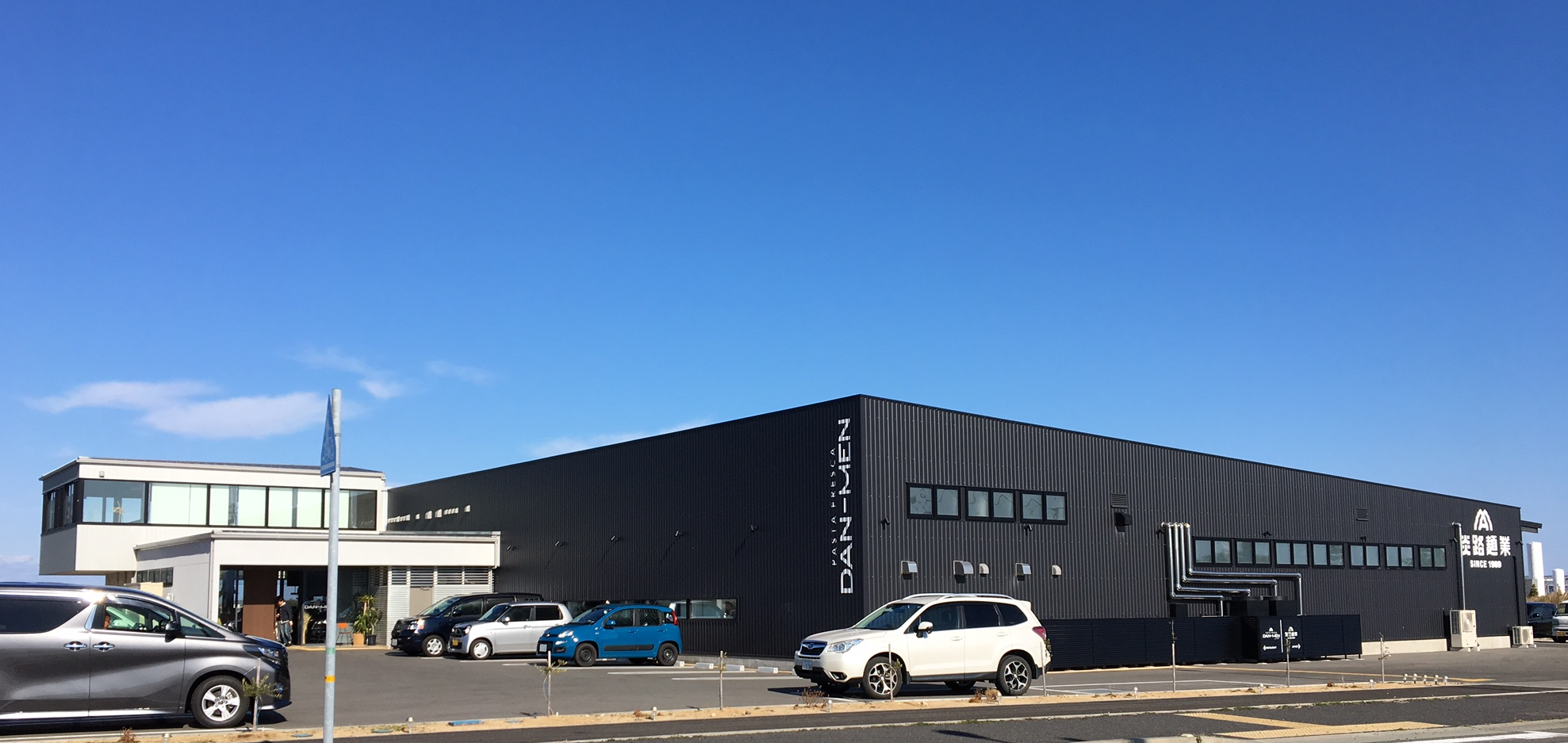 淡路麺業本社